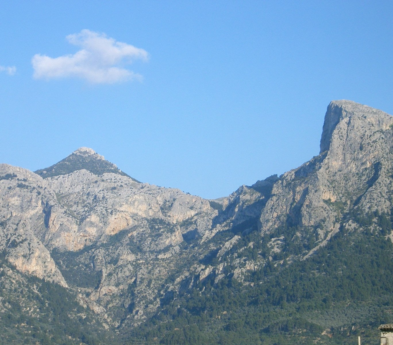 L'Ofre i el Cornador des de la Vall de Sóller. (retallada). Mallorca